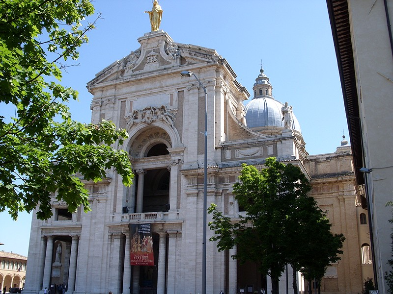 Santa Maria degli Angeli (Assisi) - Basilica